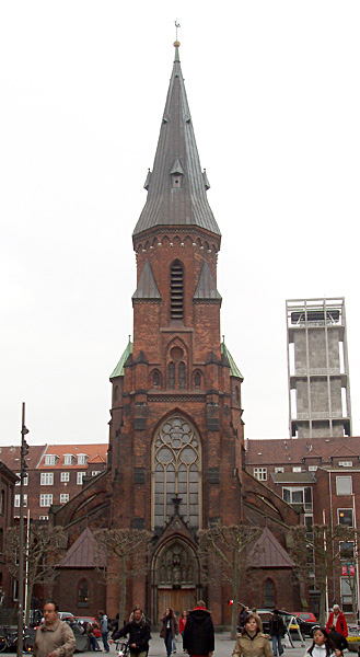 Vor Frue Kirke beliggende på Ryesgade i Århus Centrum er en romersk katolsk kirke